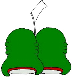 Glifo de Juarez, Hidalgo